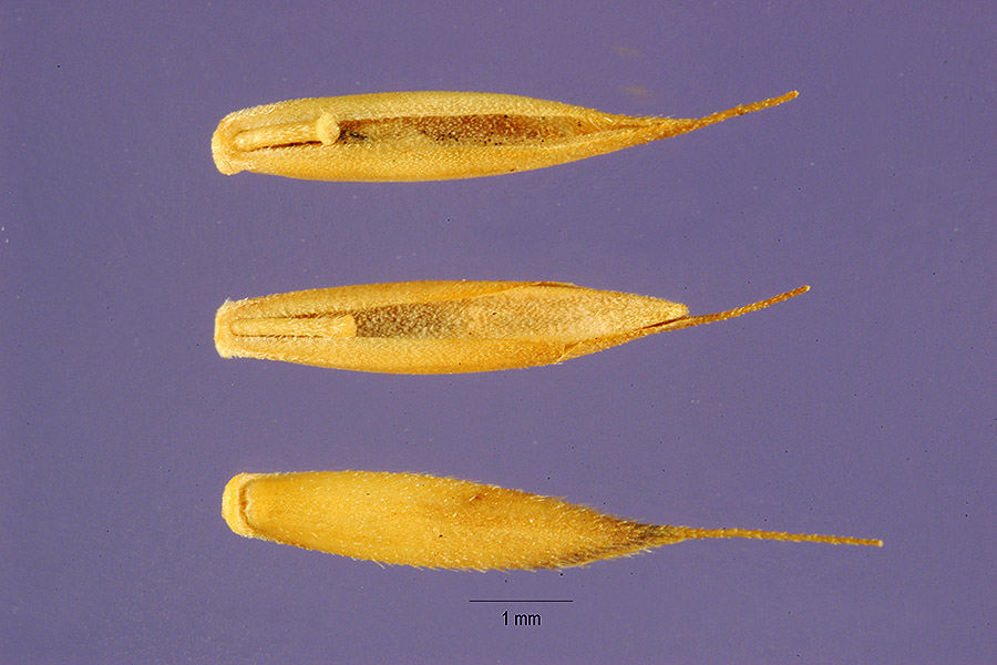 Festuca brevipila Tracey hard fescue